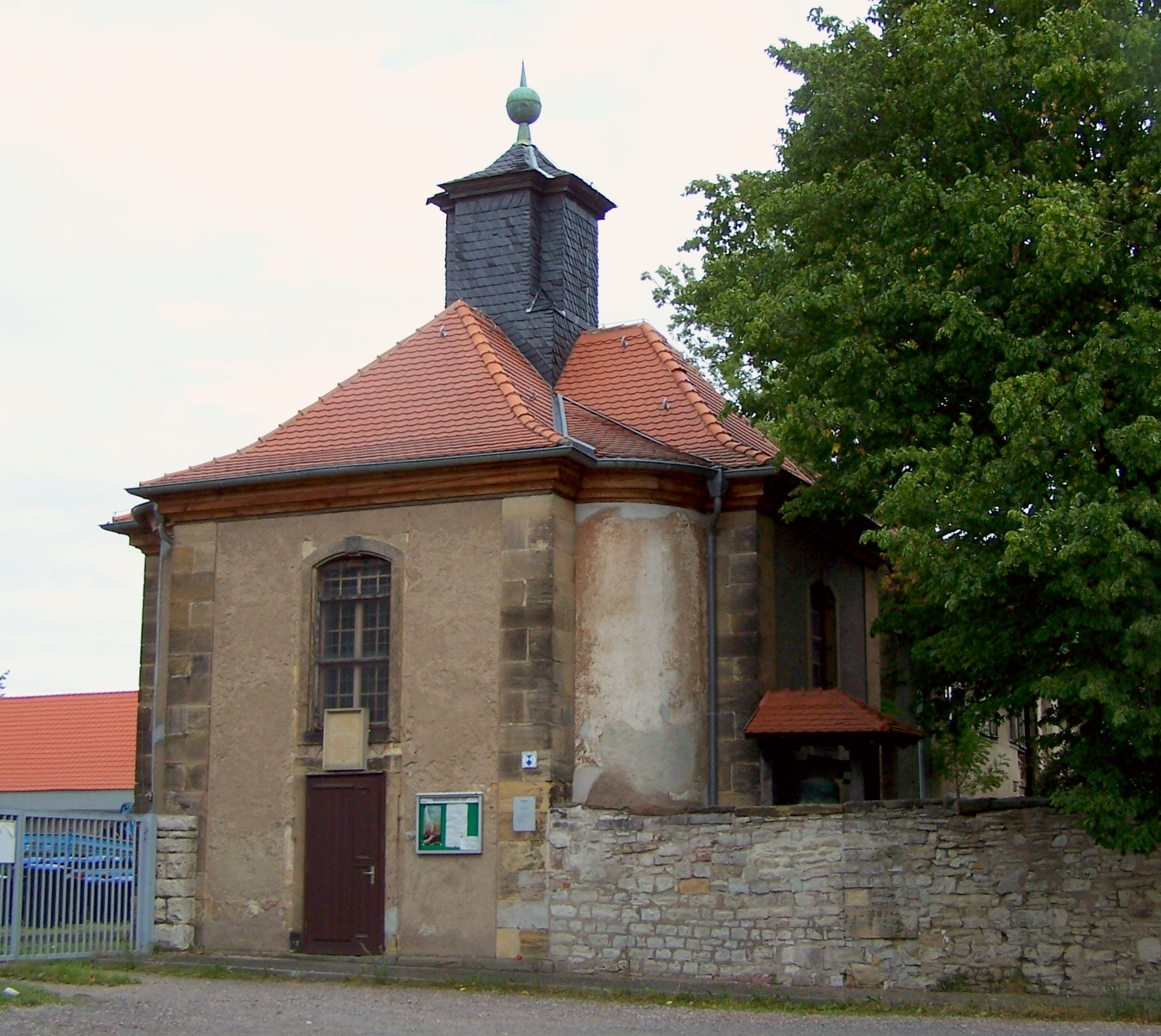 Ansicht der Gothaer Friedrichkirche an der Erfurter Landstraße.